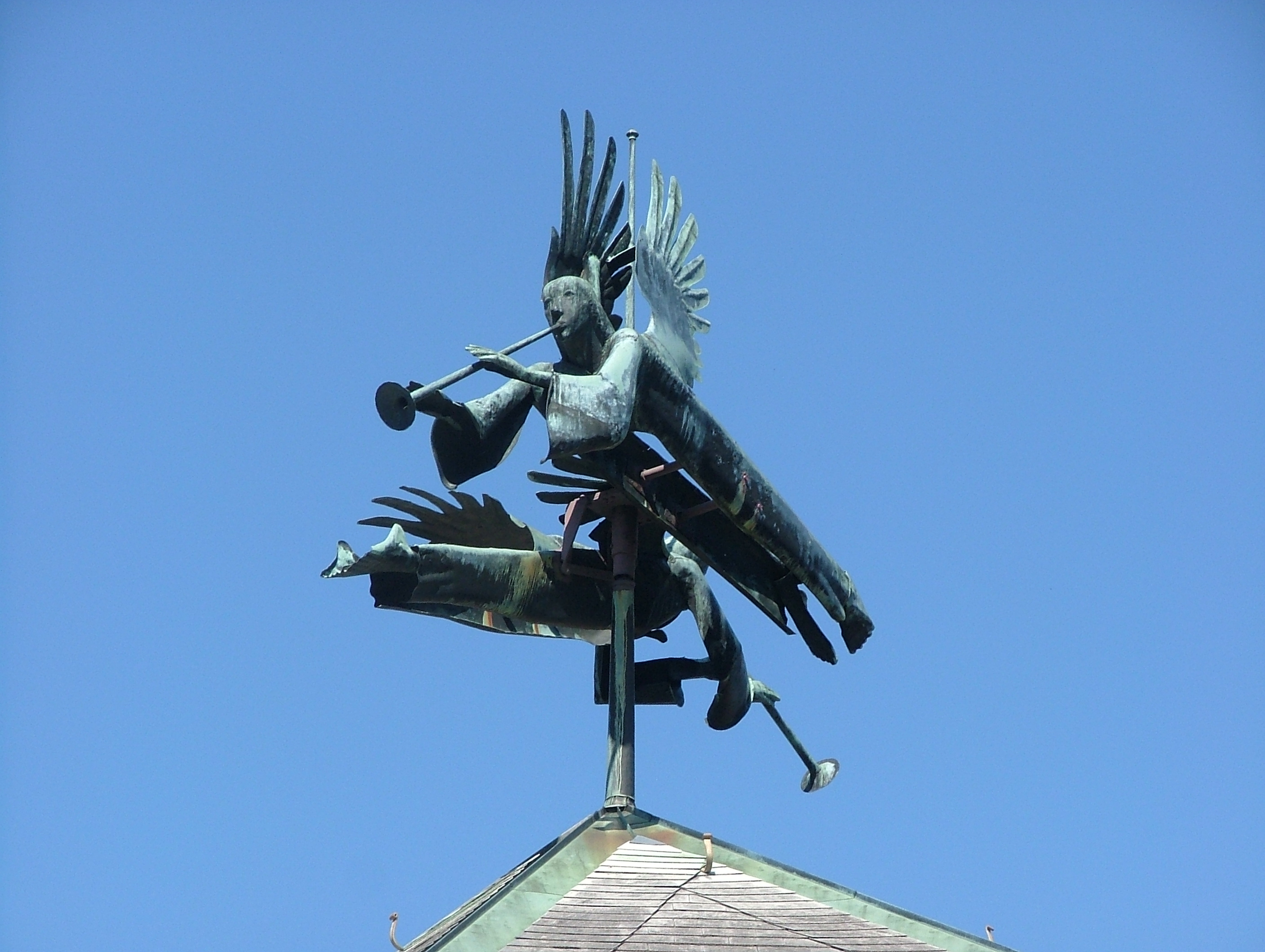 Sich drehende lebensgroße Posaunenbläser auf dem Kirchendach